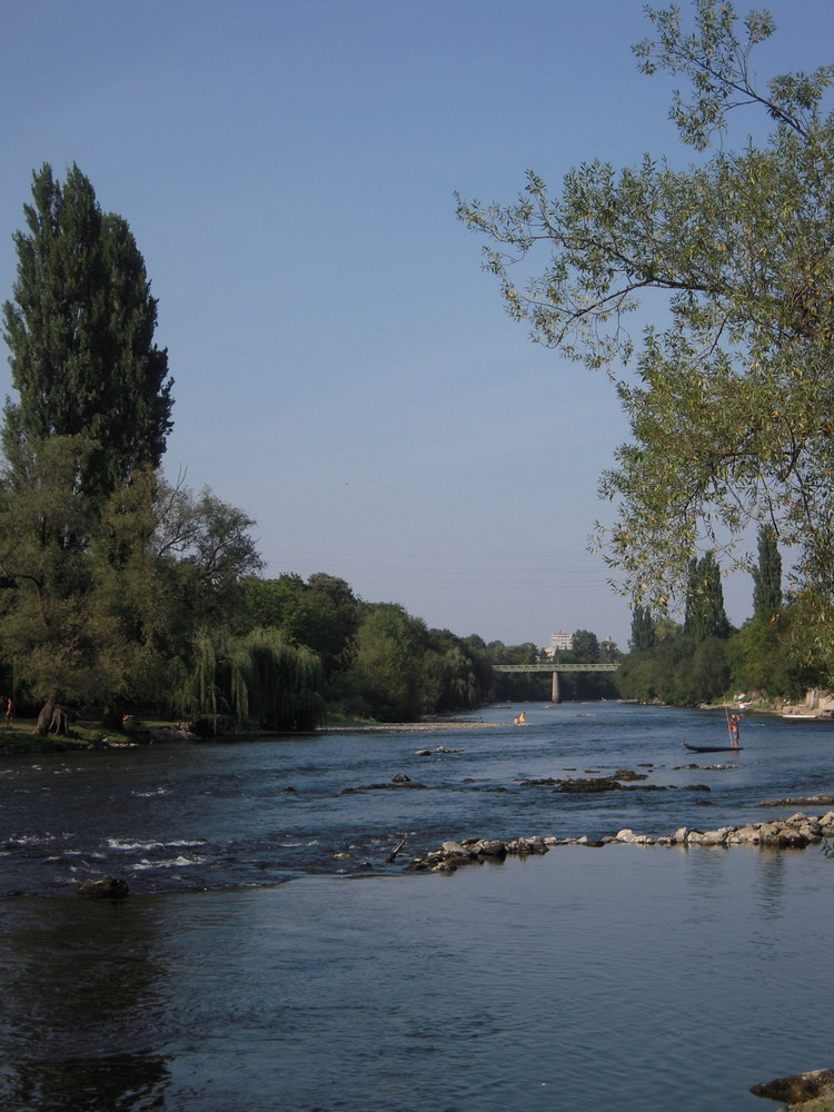 Rijeka_Vrbas_i_pogled_na_Zeleni_most_u_Banjoj_Luci